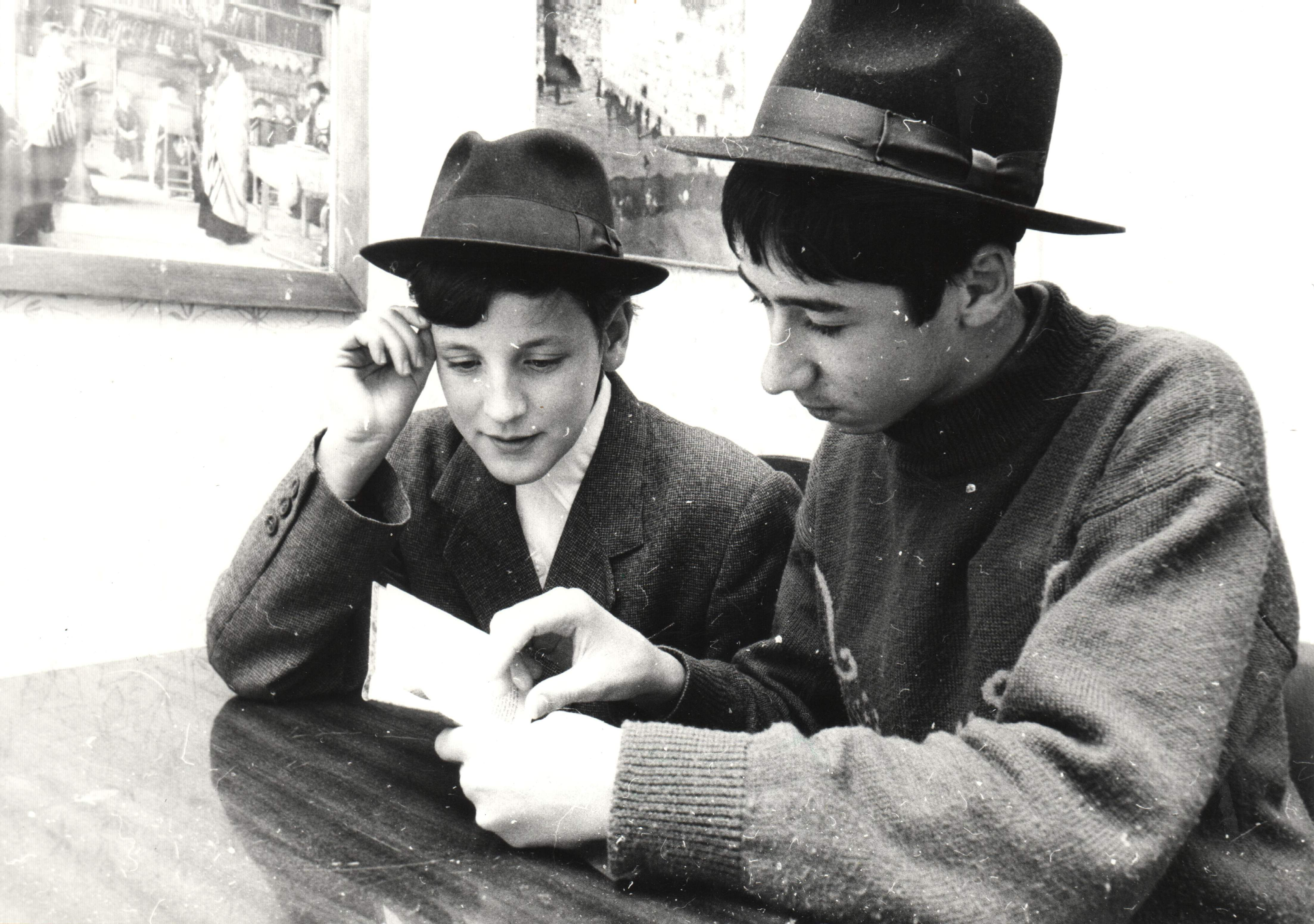 havruta at torat haim yeshiva